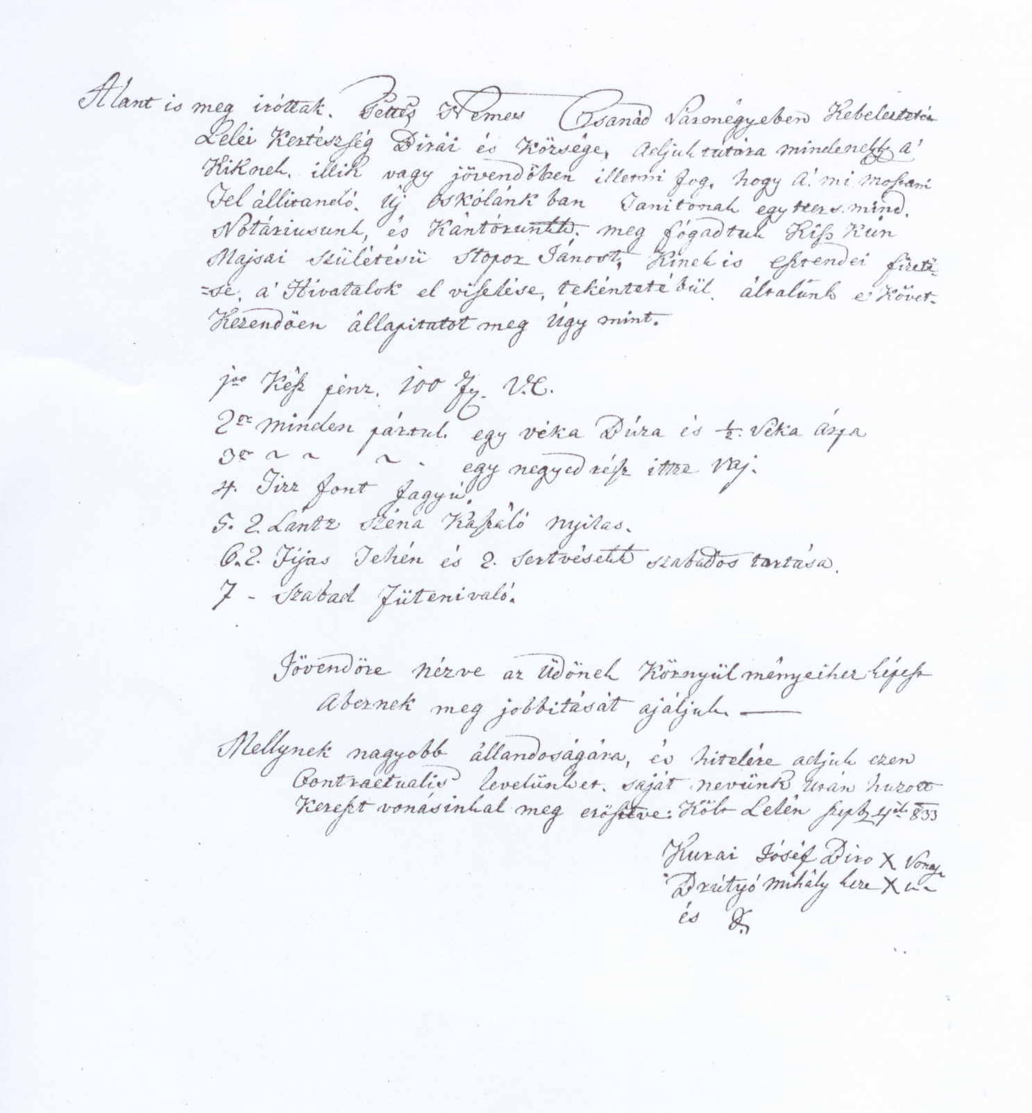 Maroslele első iskolájának építéséről szóló levél